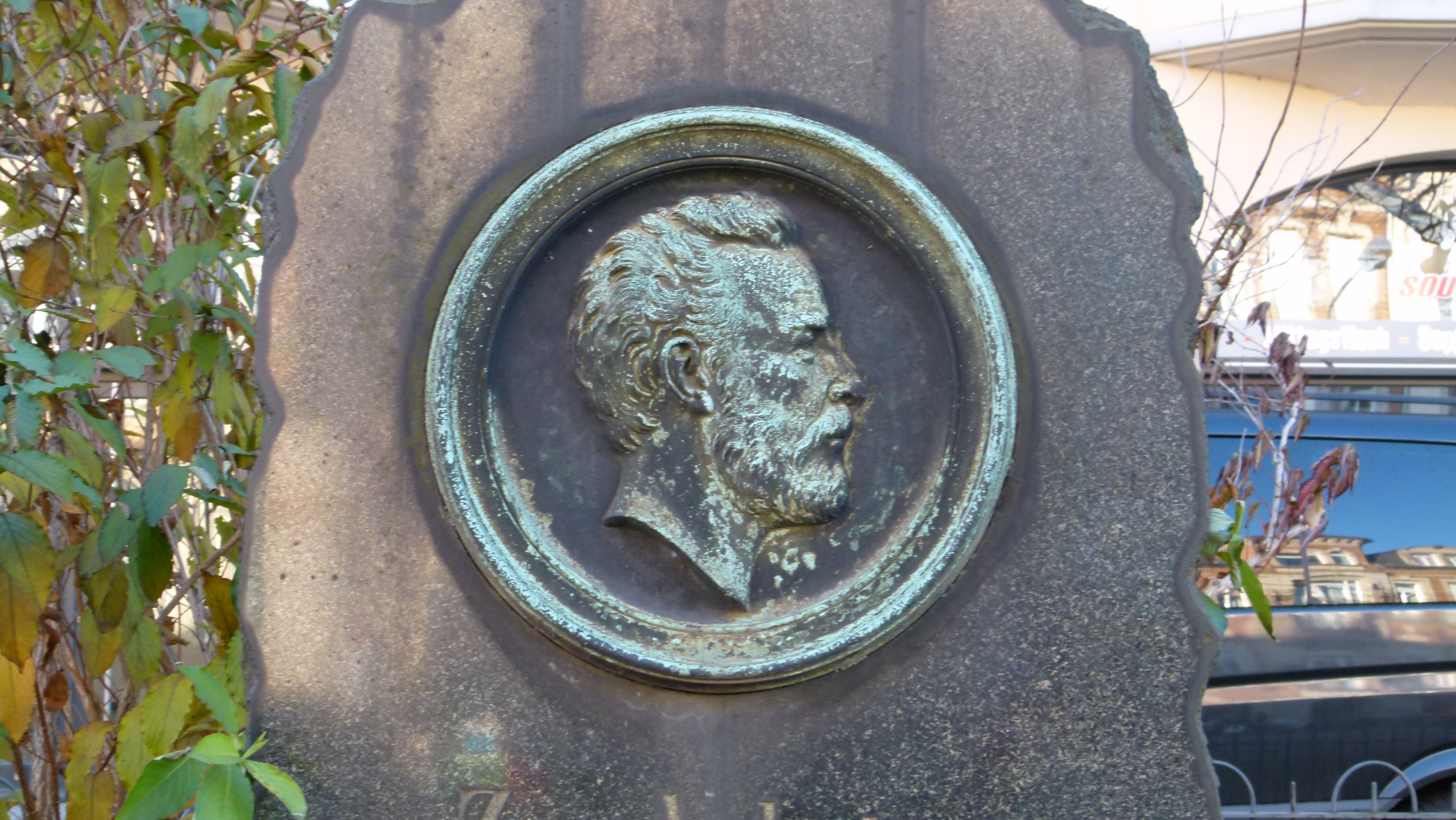 Gedenkstein für Ludwig Küntzelmann in Dresden, Bautzner Landstraße 8, Weißer Hirsch